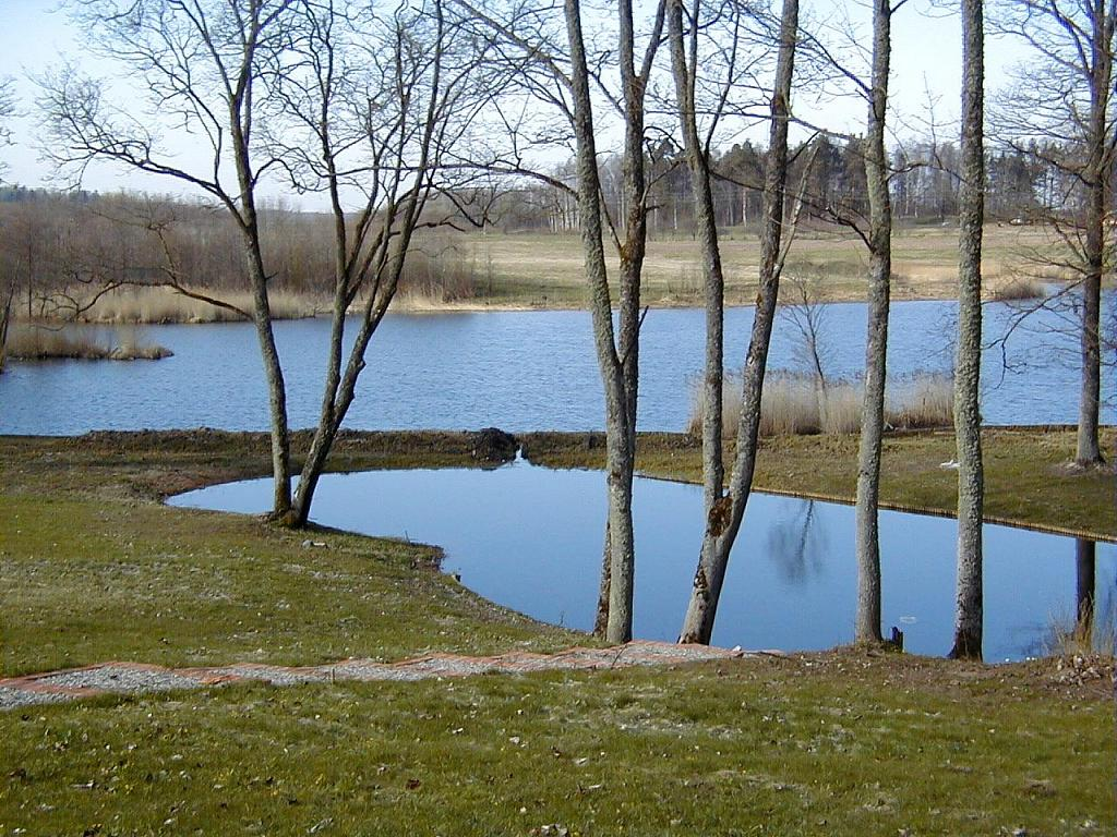 Dursupes pils dīķis 2002-04-20